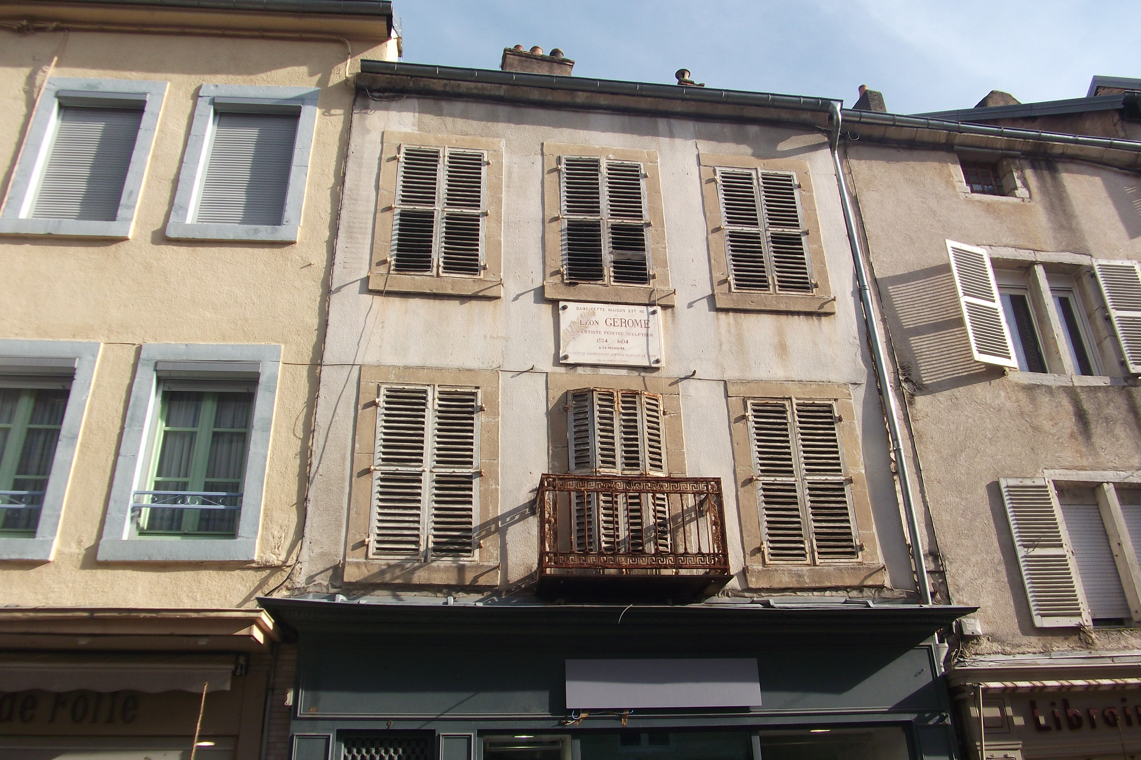 La maison natale de Jean-Léon Gérôme à Vesoul (Haute-Saône, France).